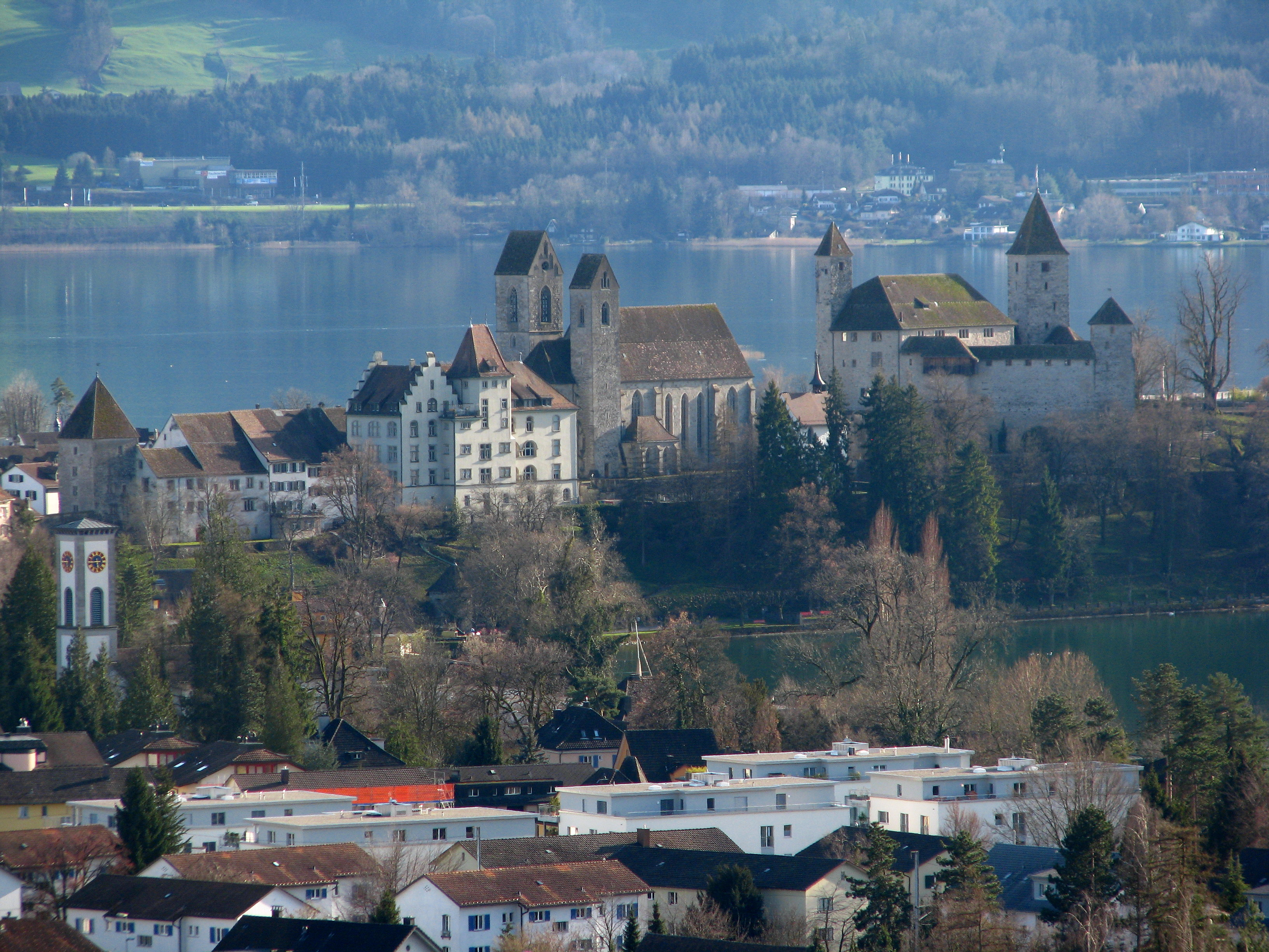 Kempratner Bucht (Bay of Kempraten) and Herrenberg in Rapperswil (SG), i.e. Stadtmuseum, Stadtpfarrkirche St. Johann (St. John's Church), Liebfrauenkapelle and Schloss Rapperswil, as seen from Frohberg in Kempraten-Lenggis (Switzerland); Altendorf and Obersee (upper Lake Zürich) in the background.